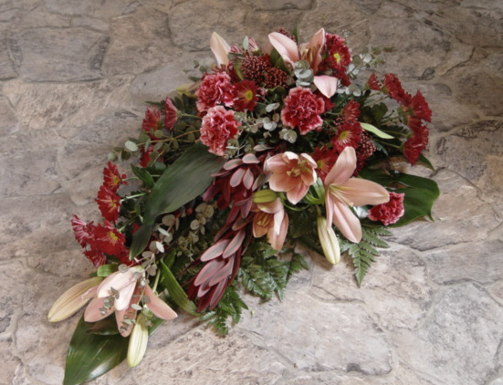 Surulaite - dekoratiivinen tyylisuunta